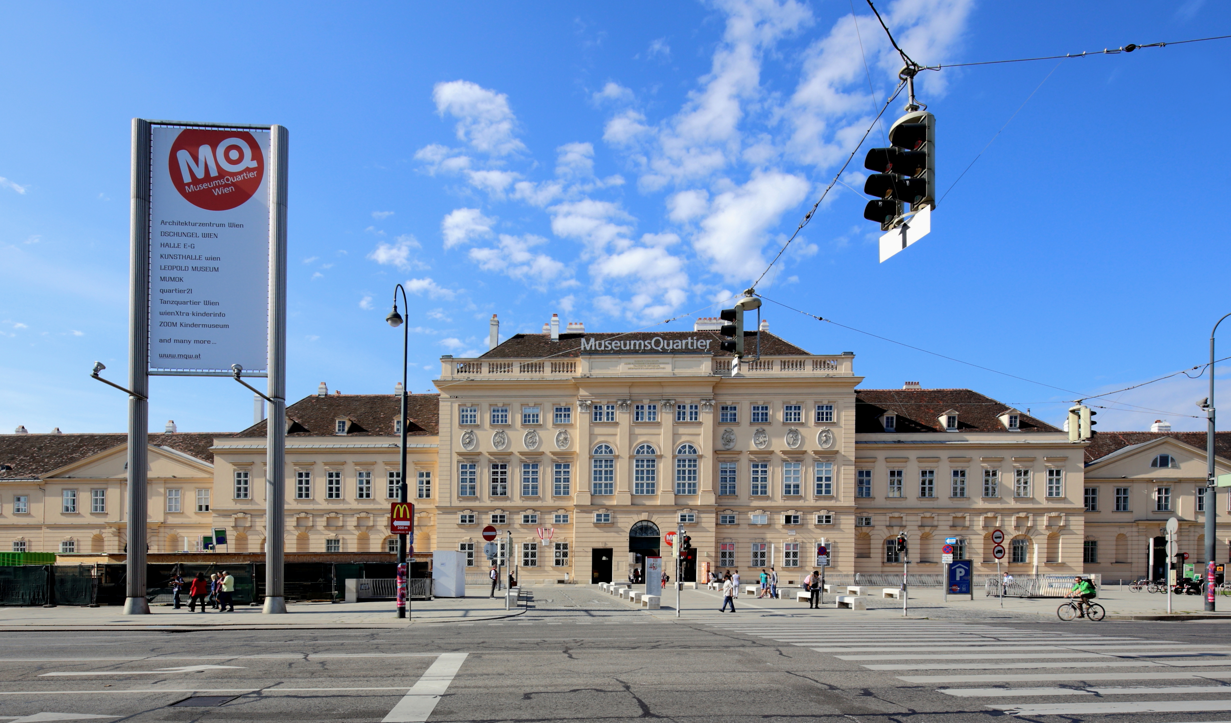 Das Museumsquartier in der österreichischen Bundeshauptstadt Wien. Der Gebäudekomplex wurde Anfang des 18. Jahrhunderts als Hofstallungen errichtet. 1921 wurde das Areal erstmals für Messe- und Ausstellungszwecke genutzt und in der Folge zum Messepalast umgebaut und auch umbenannt. 1985 war der Messepalast erstmals ein Veranstaltungsort der Wiener Festwochen, die dort bald ihre Hauptspielstätte fanden. In den 1990er Jahren wurde der Baukomplex zu einem Museum umgebaut und 2001 eröffnet.